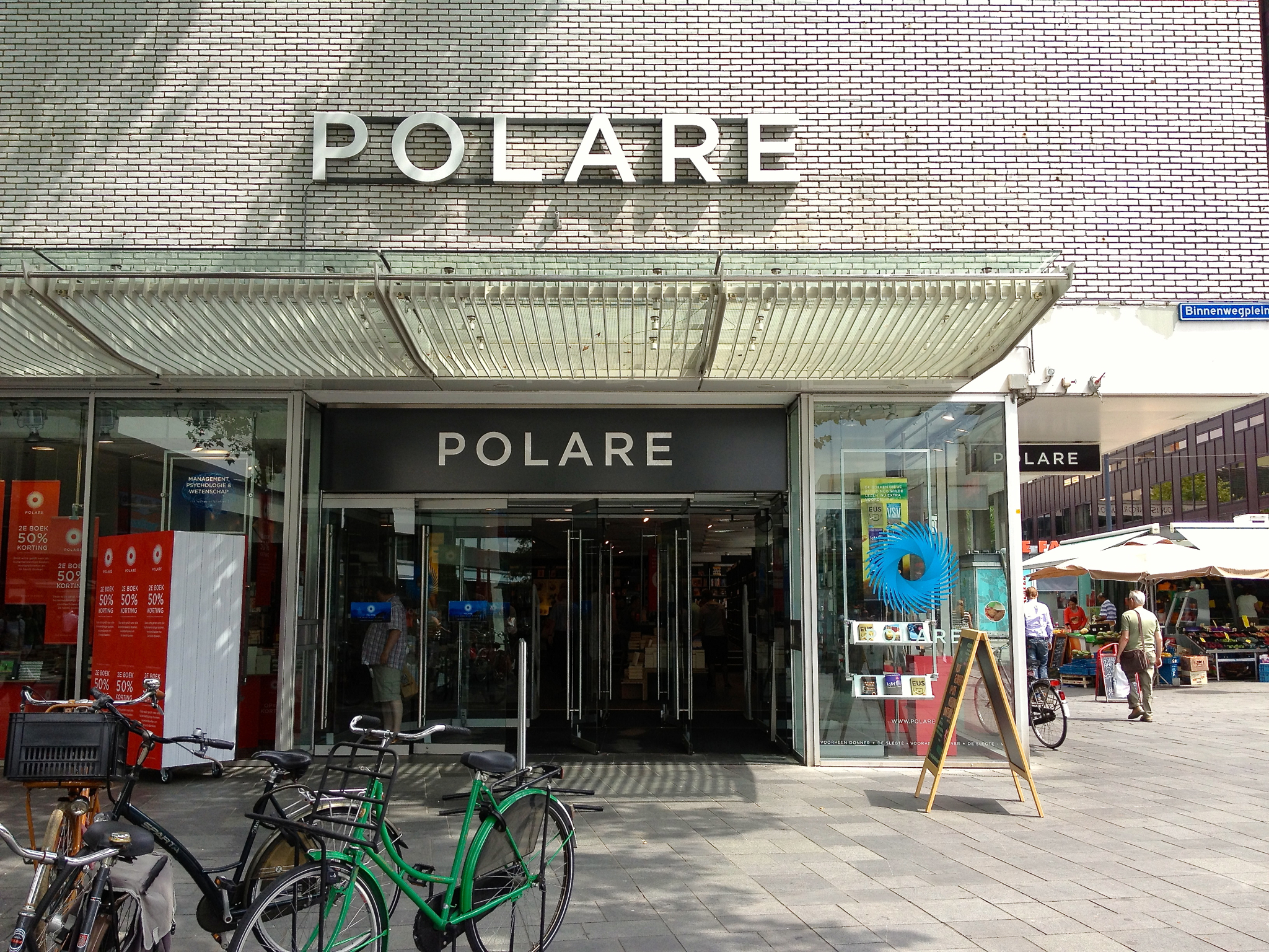 Het is wel even wennen hoor. 'Donner', een van de grootse en best gesorteerde fysieke boekenwinkels van Nederland, heet nu 'Polare', het gevolg van het samengaan van 'Selexys' en 'De Slegte'. De naam Polare is afkomstig van Stella Polare, de Poolster, het oudste navigatiemiddel van de mensheid.